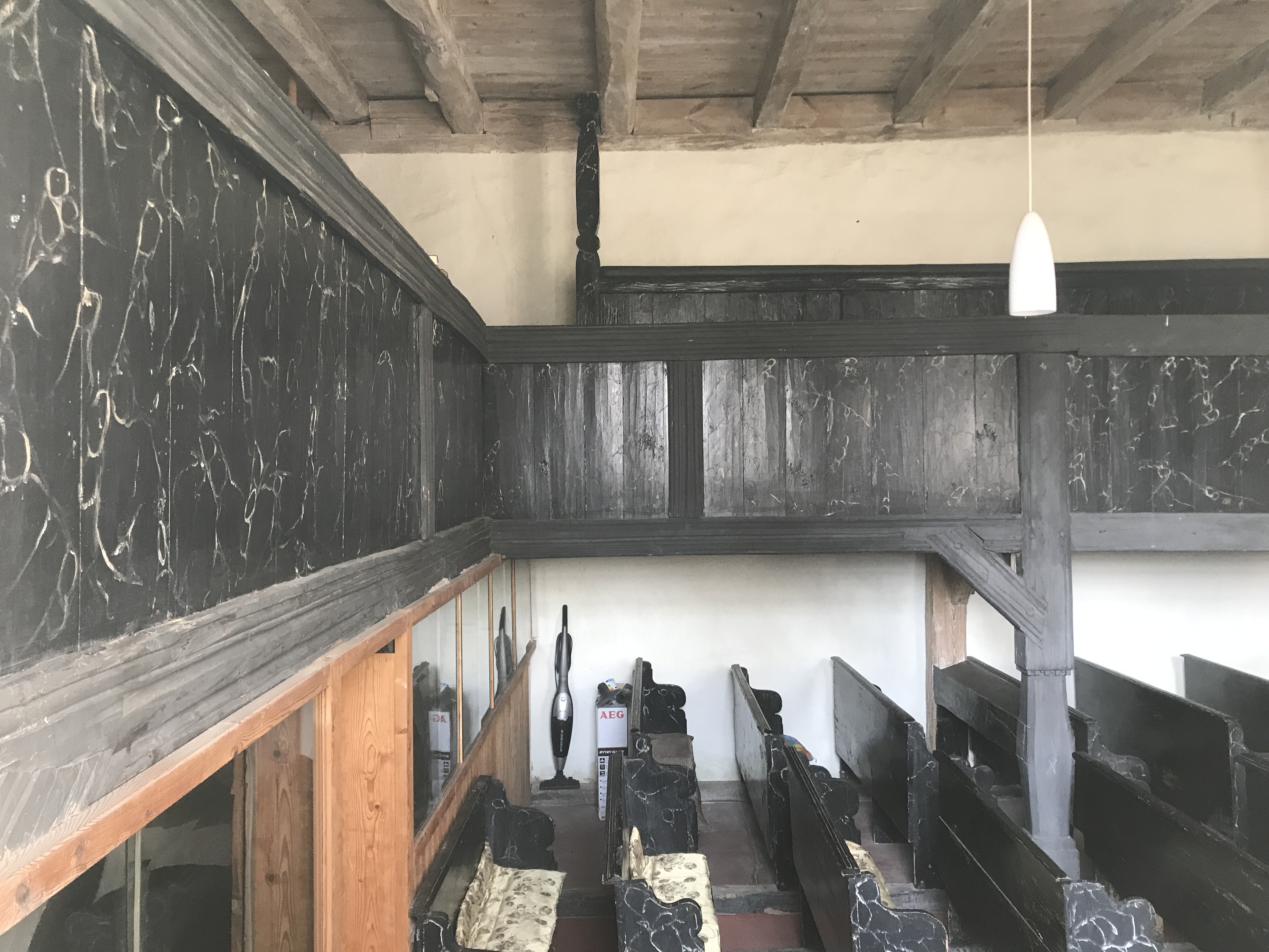 Die Dorfkirche Kreblitz ist eine Feldsteinkirche aus der Mitte des 14. Jahrhunderts in Kreblitz, einem Ortsteil der Stadt Luckau im Landkreis Dahme-Spreewald in Brandenburg.